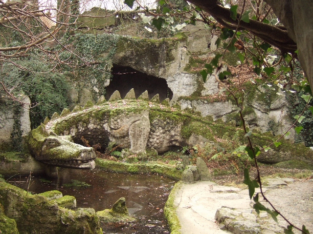 Franz Josef Krings: Drachenhöhle (1933) in der Nibelungenhalle in Königswinter